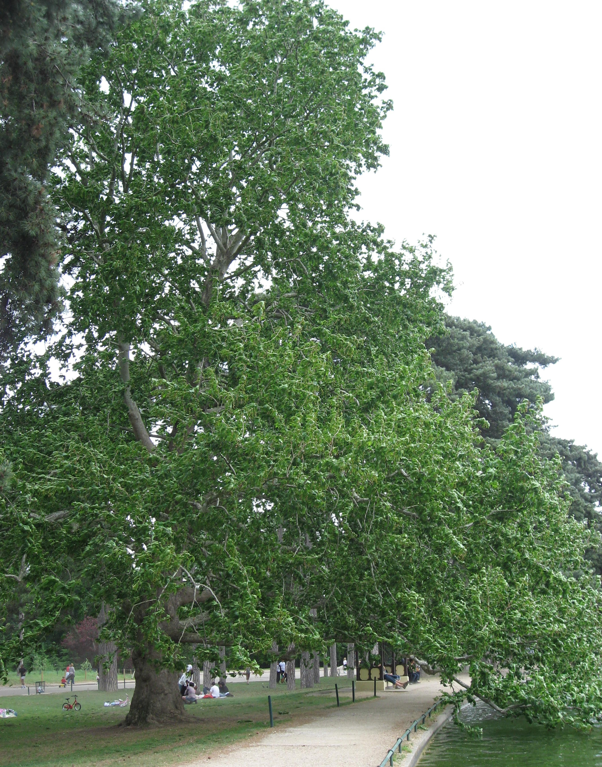 Platanus orientalis in Bois de Boulogne Map: 48° 51' 59" N 2° 15' 42" E